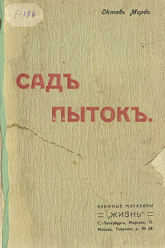 Traduction russe de Le Jardin des dupplices, d'Octave Mirbeau (1848-1917)